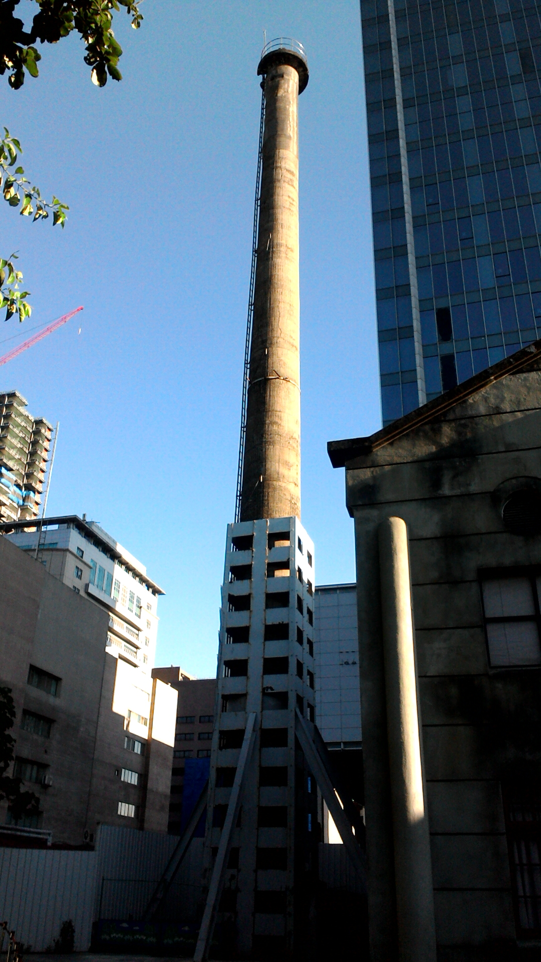 松山菸廠煙囪,台北市信義區三張犁次分區新仁里